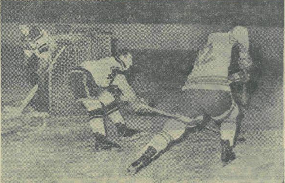 Tekma HK Olimpije.